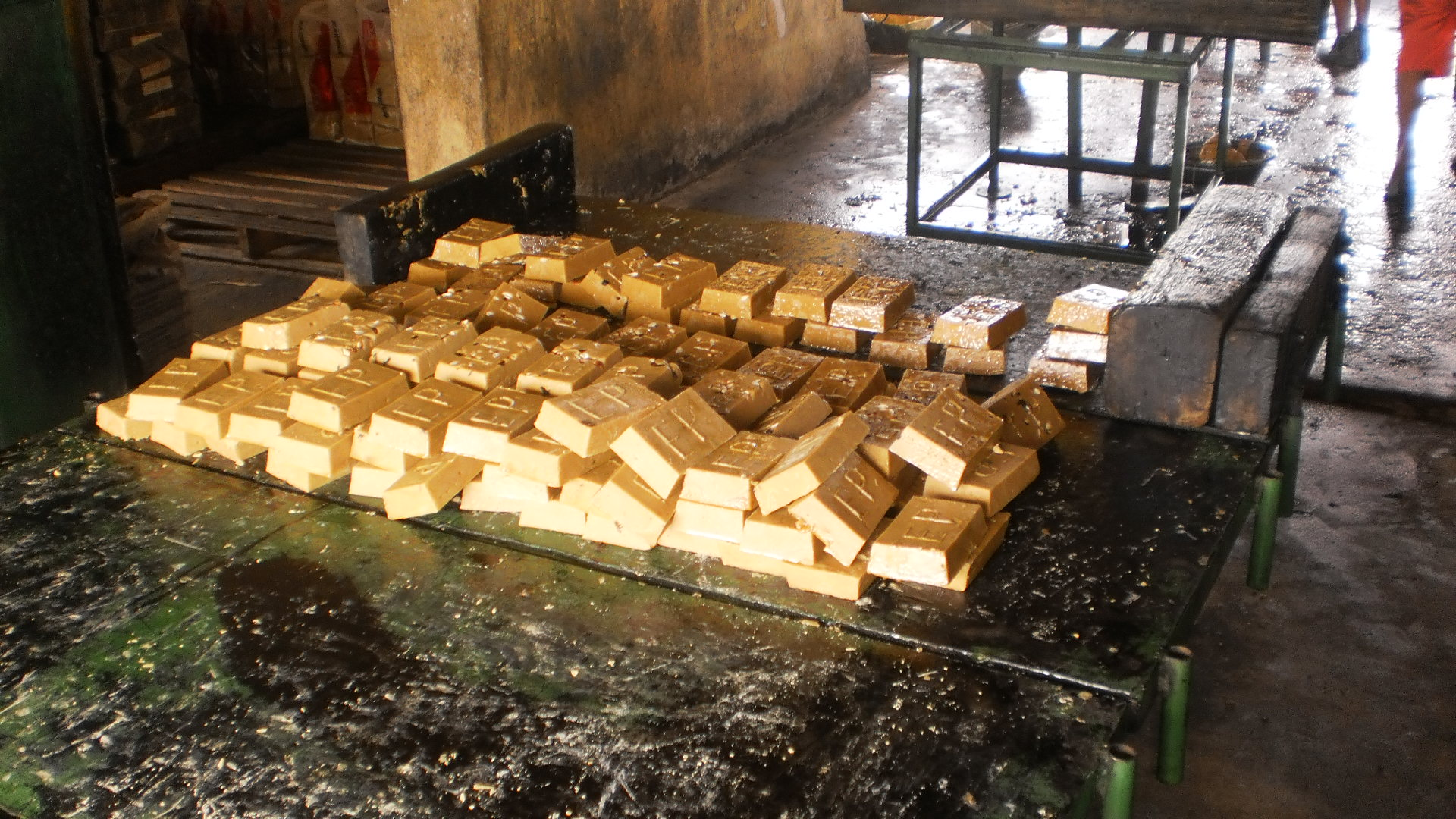 Doce típico do Brasil feito a partir da cana-de-açúcar. Engenho de rapadura em Barbalha - Ce